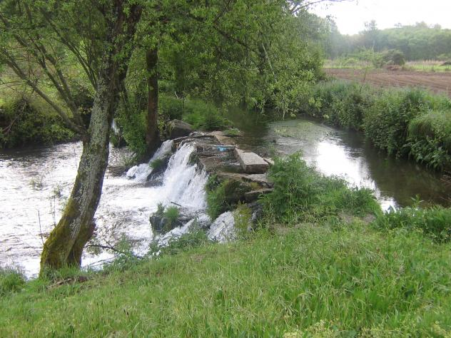 Río Uma. Tramo en Lira.